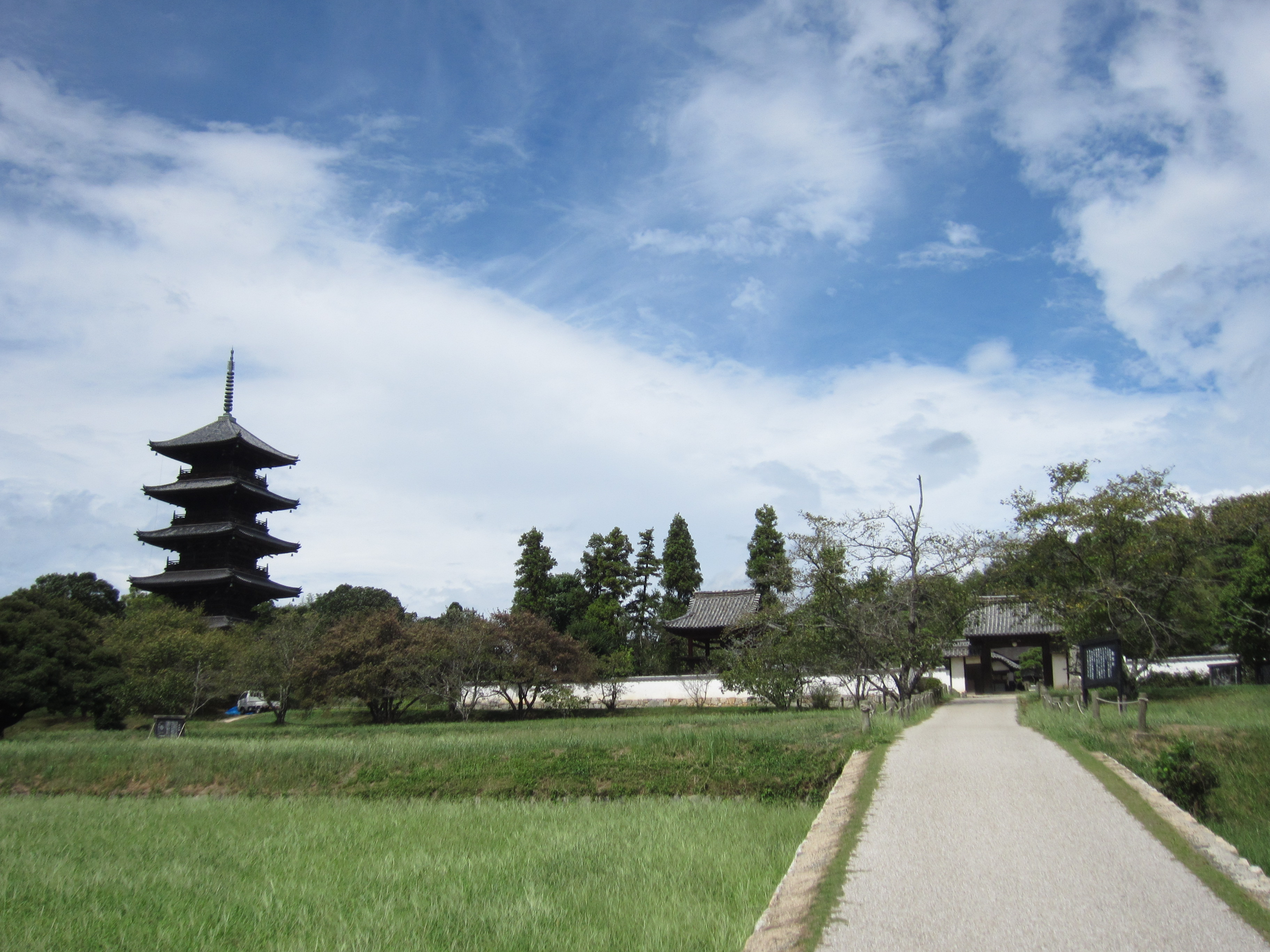 備中国分寺 全景